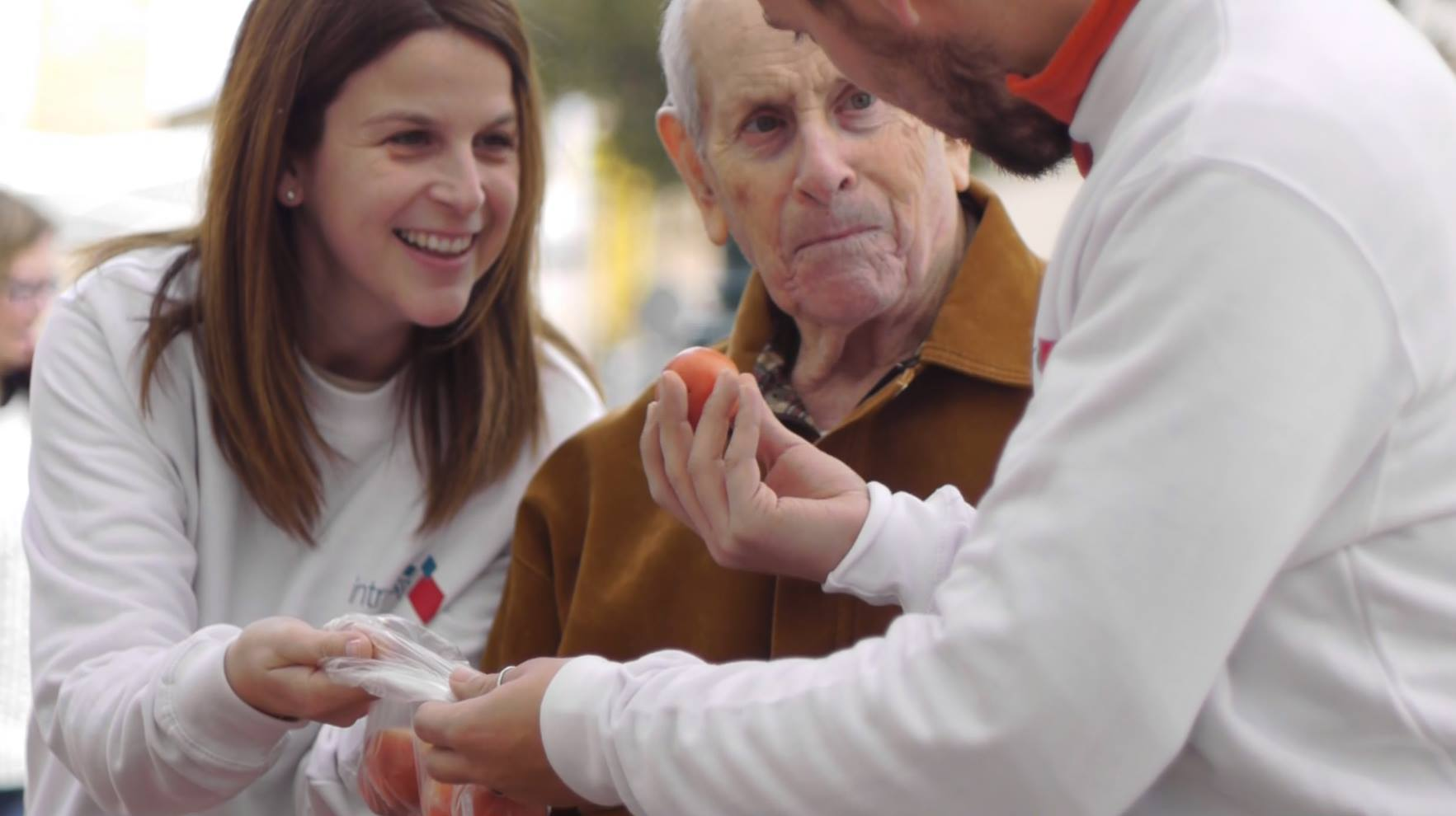 Atención a las personas mayores en un servicio de Intress